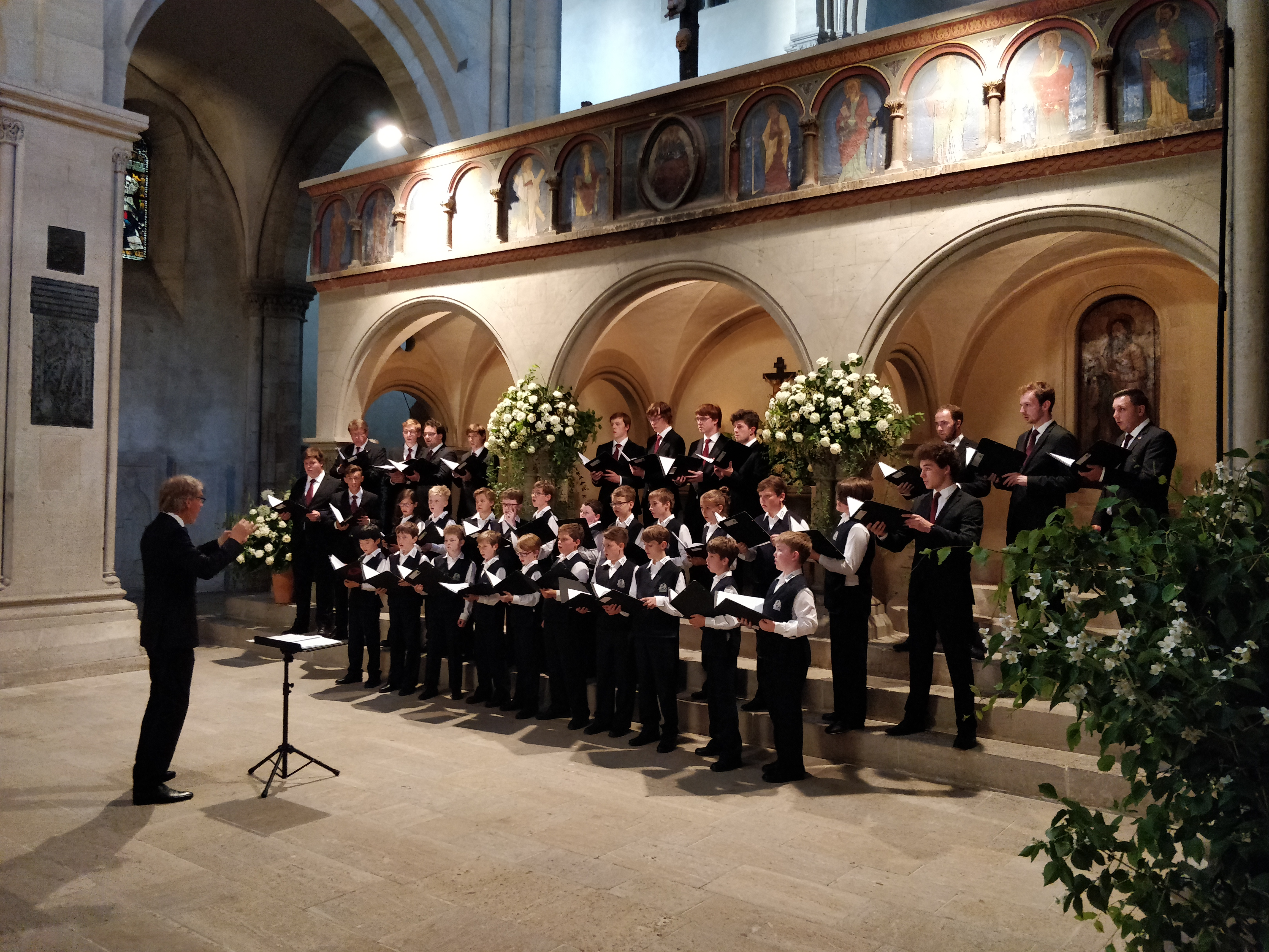 Die Wuppertaler Kurrende im Rahmen ihrer Fronleichnam-Tour 2018 im Naumburger Dom